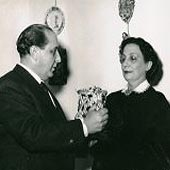 Goffredo e Maria Bellonci, fotografia anni '50 Fonte